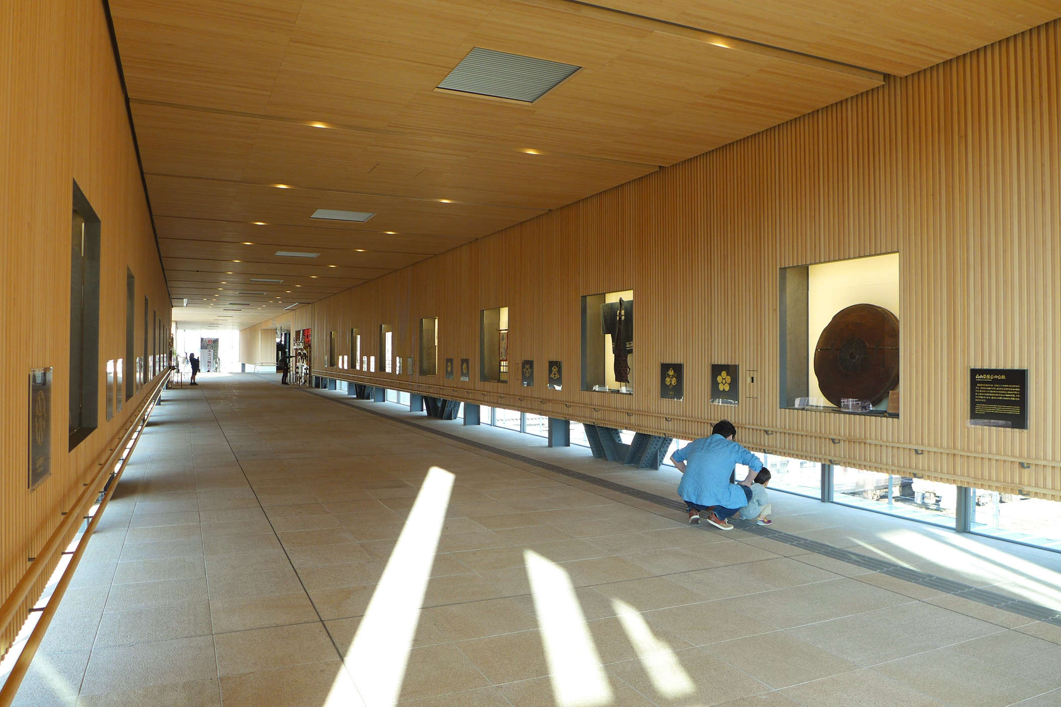 Takayama Station